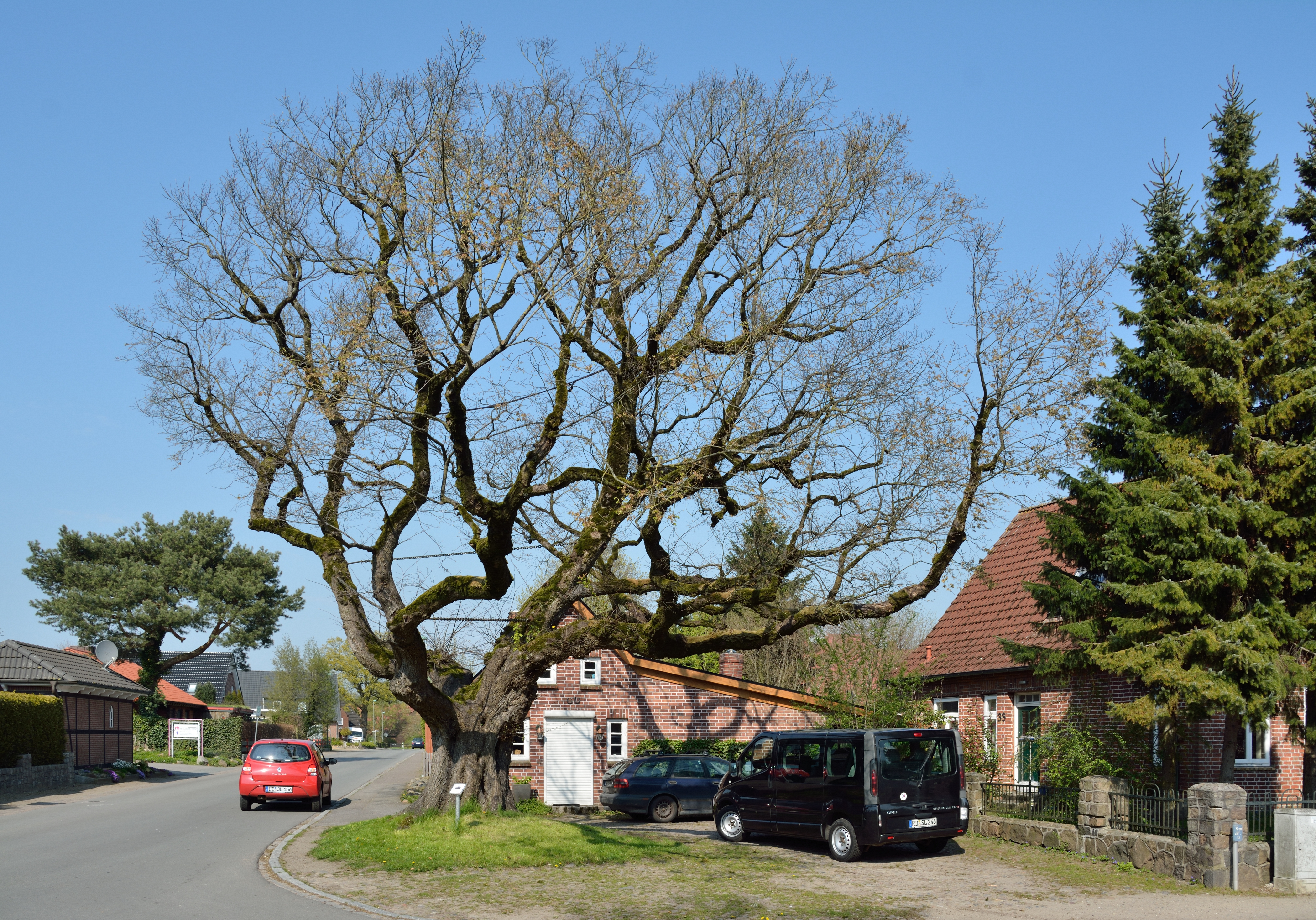 Krogaspe, alter Baum an der Kreuzung Hauptstrasse/Ringstrasse